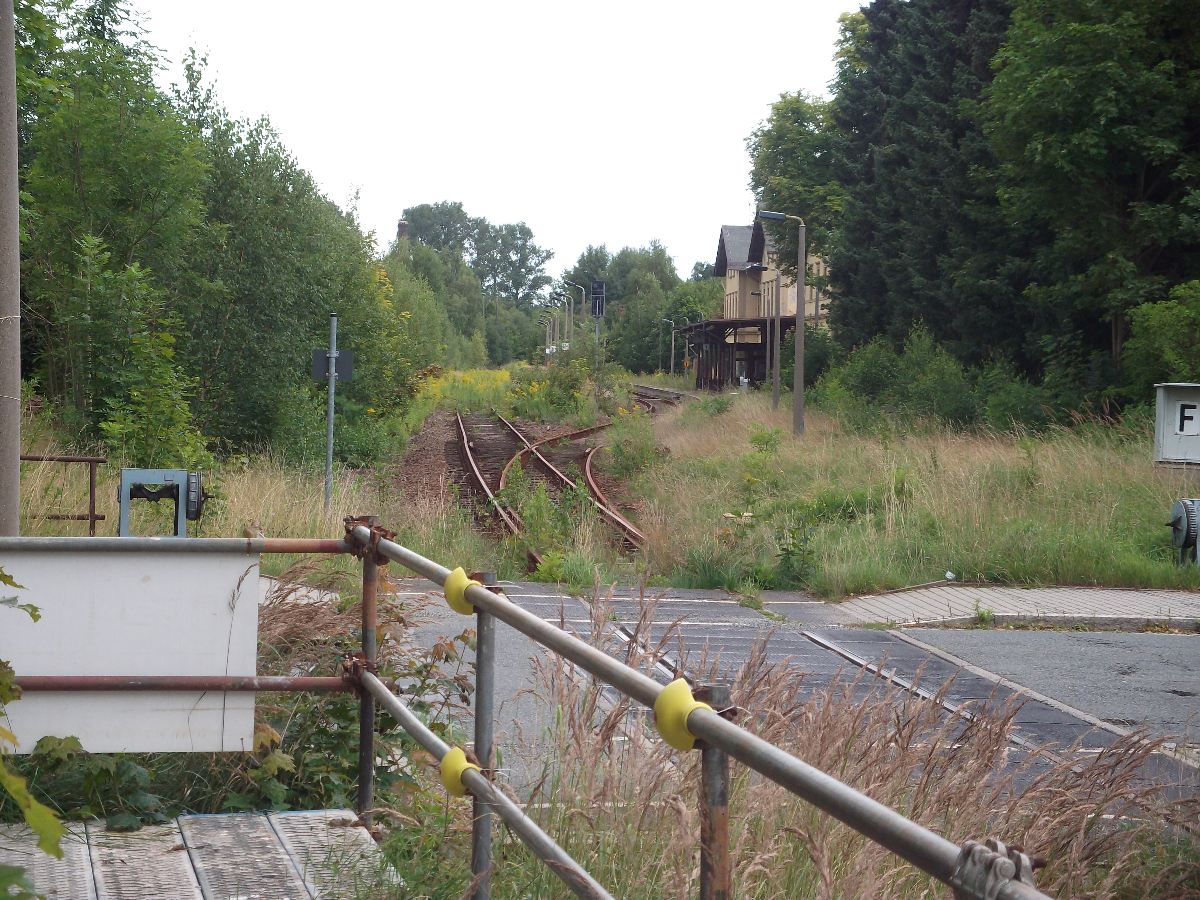 ehemaliger Bahnhof - der Bahnhalt ist jetzt 200m weiter östlich